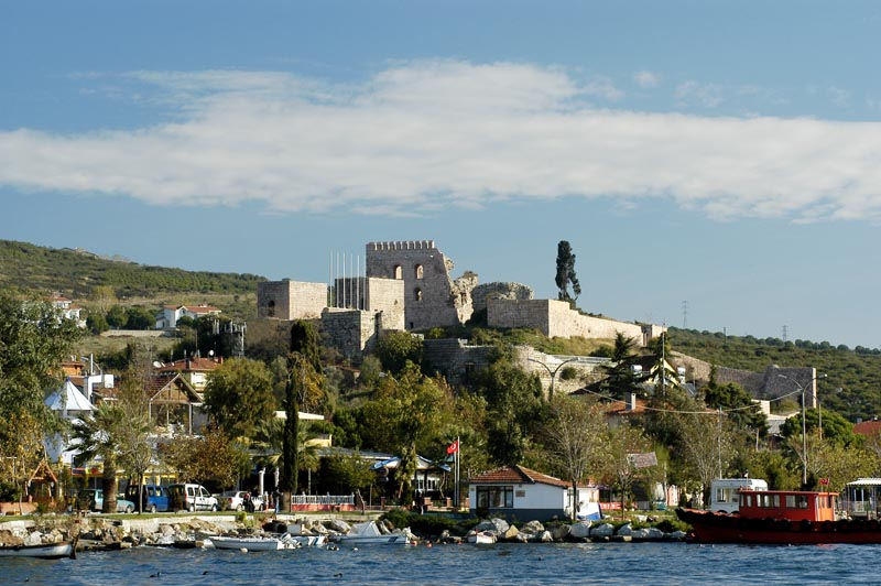 Gebze deznize açılan penceresi.